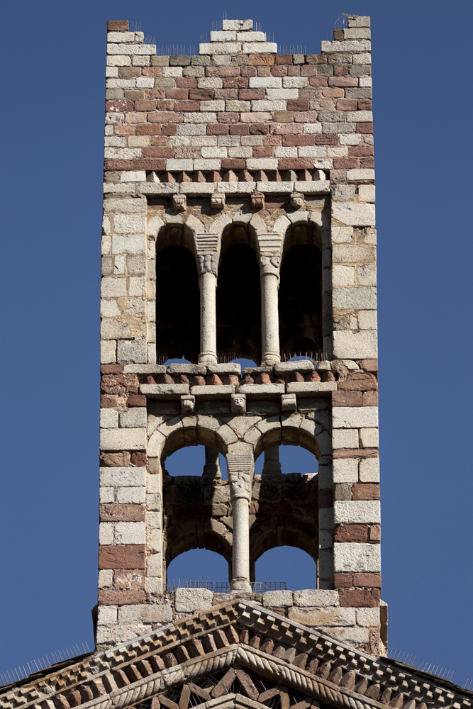 unidentified Spain